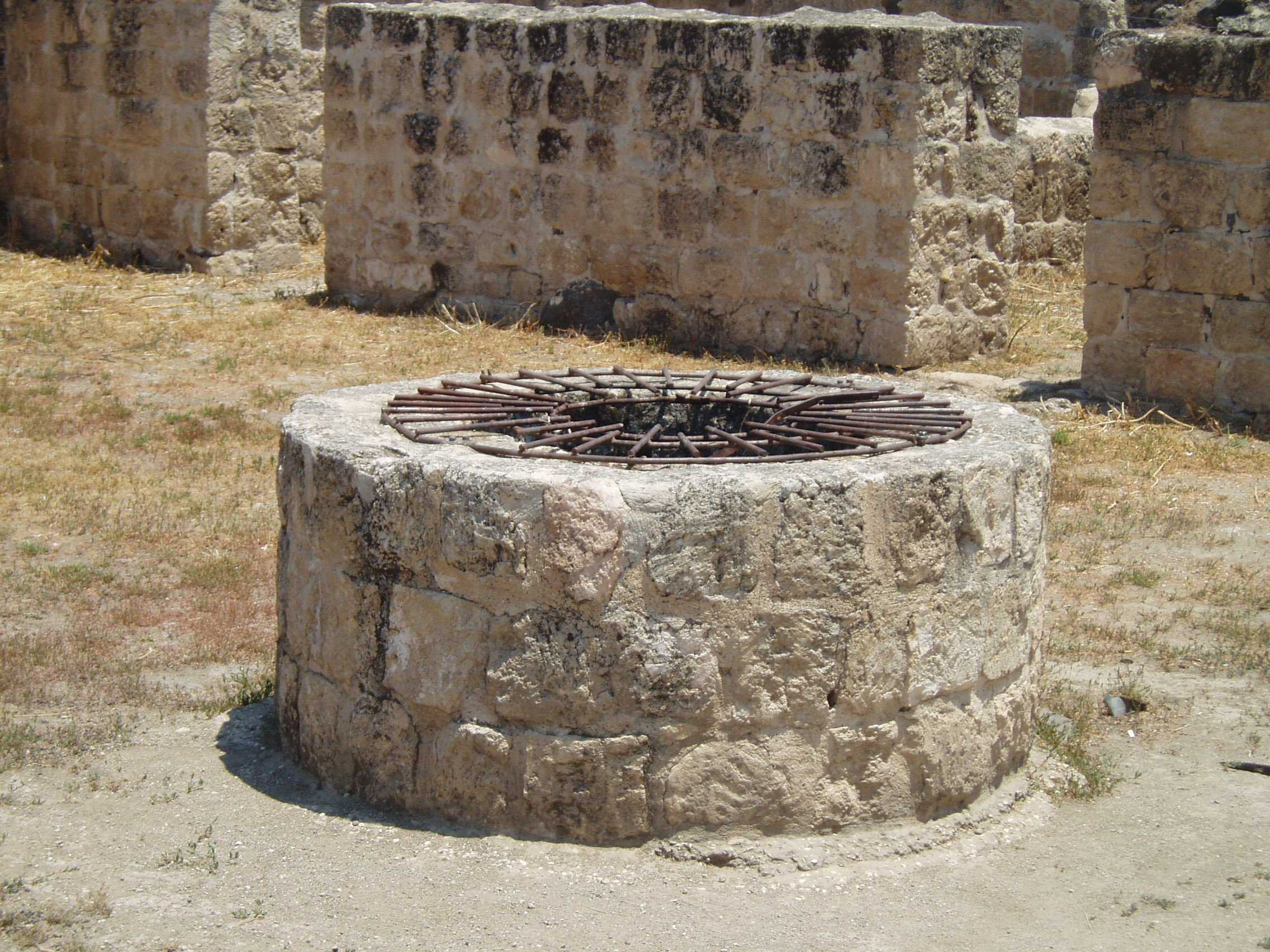 Well at Yarda